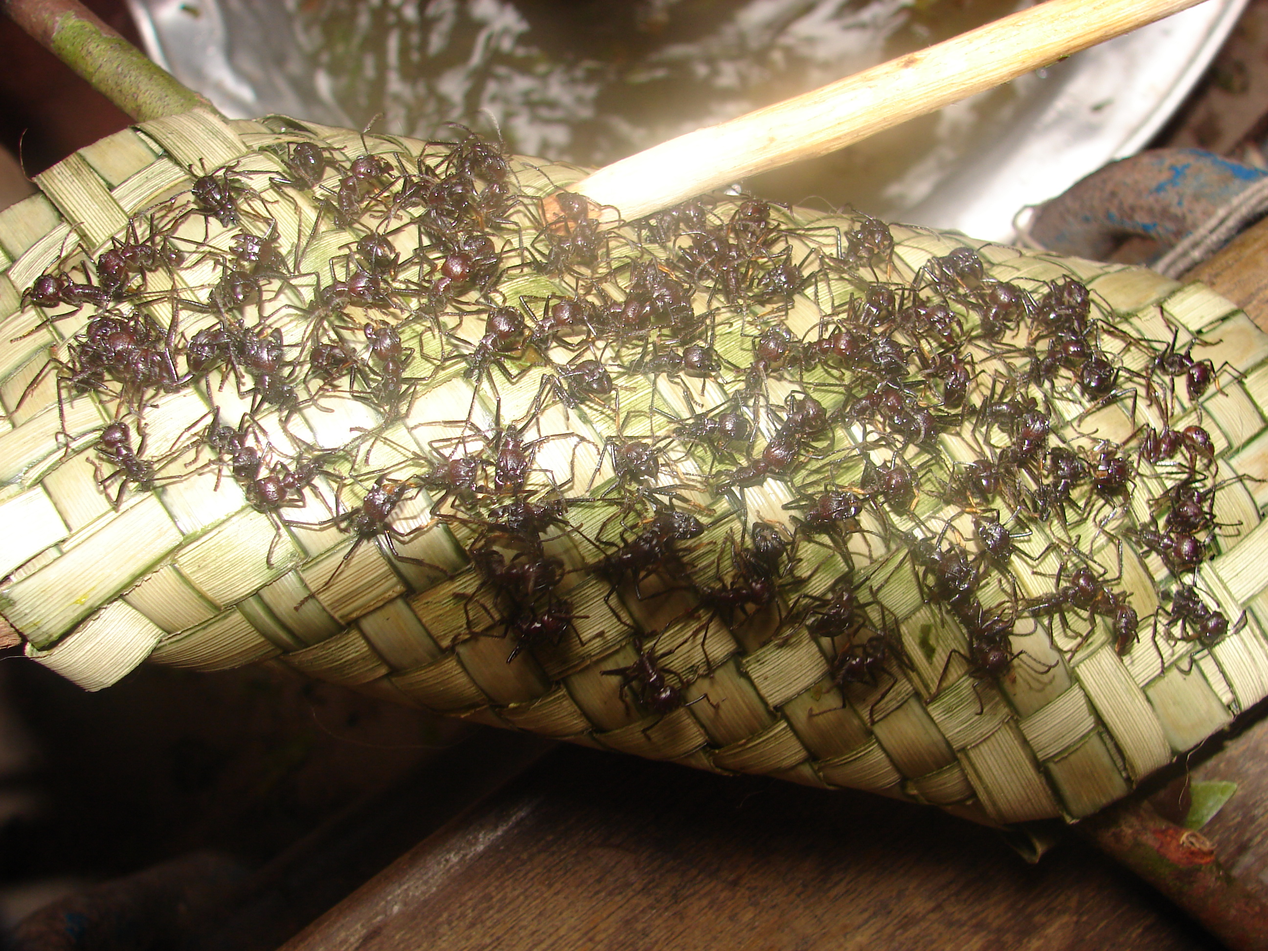 Luva com formigas tucandeiras para ritual de passagem do povo Sateré-Mawé AM